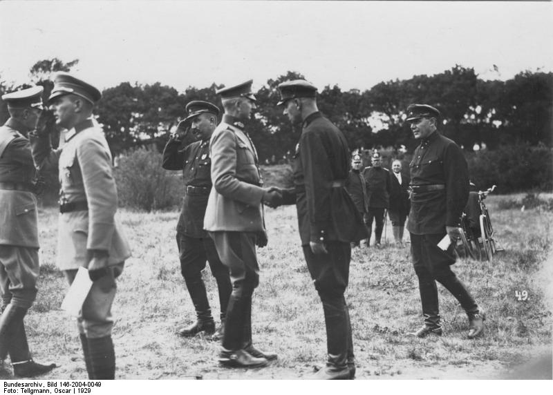 Pionierübung 1929 an der Elbe bei Burg bei Magdeburg. General der Pioniere Generalleutnant Sehmsdorf begrüßt die an der Pionier-Übung als Gäste teilnehmende russische Offiziersdelegation.